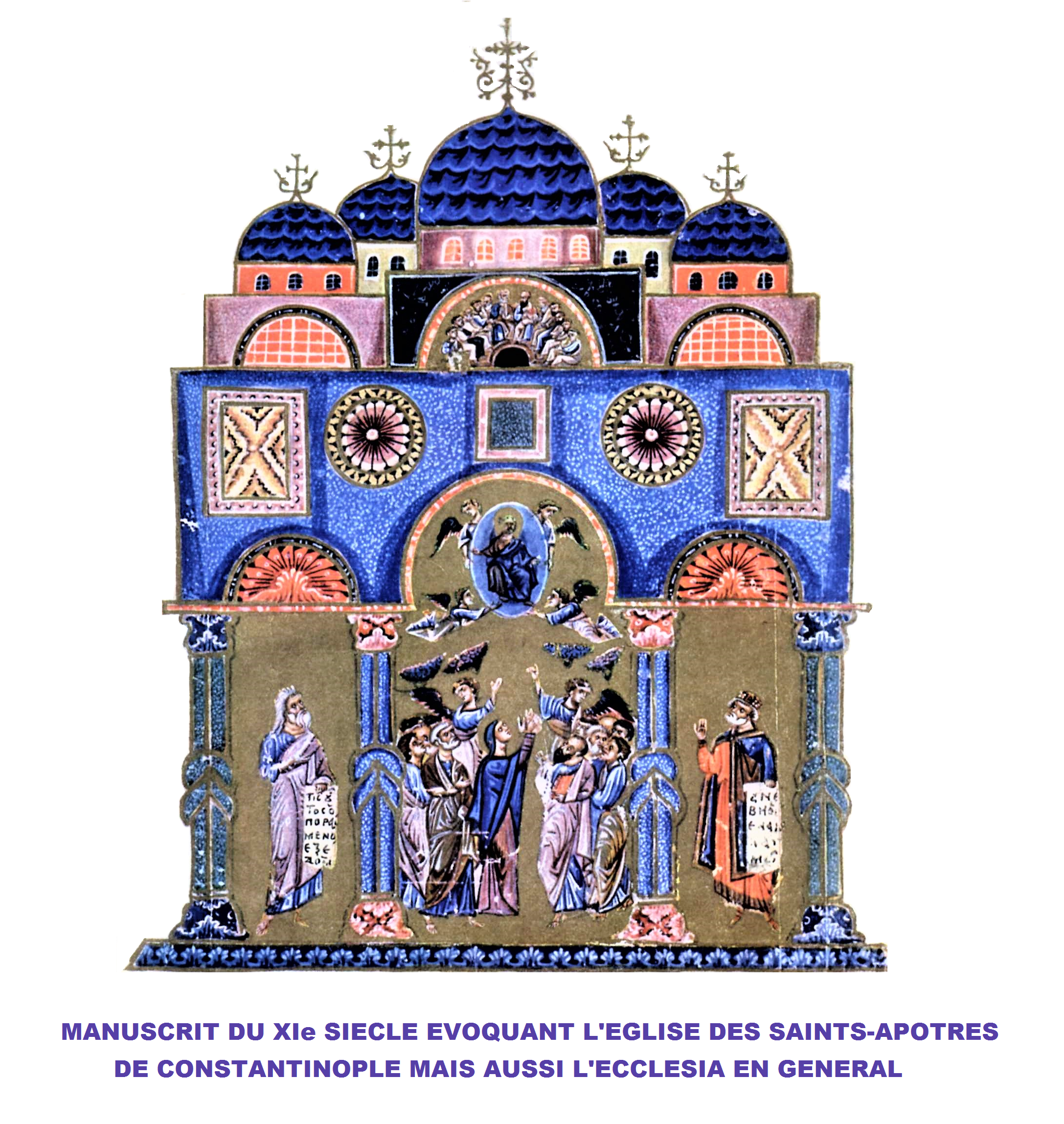 Evocation de l'église des Saints-Apôtres de Constantinople et de l'Ecclesia byzantine en général sur un manuscrit du XIe siècle (image Commons modifiée)